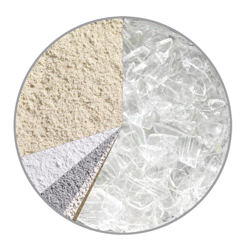 Foto Anteile der Rohstoffe in Behälterglas